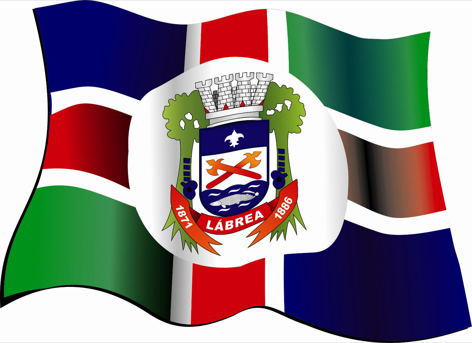 Bandeira do município de Lábrea, Amazonas, Brasil.